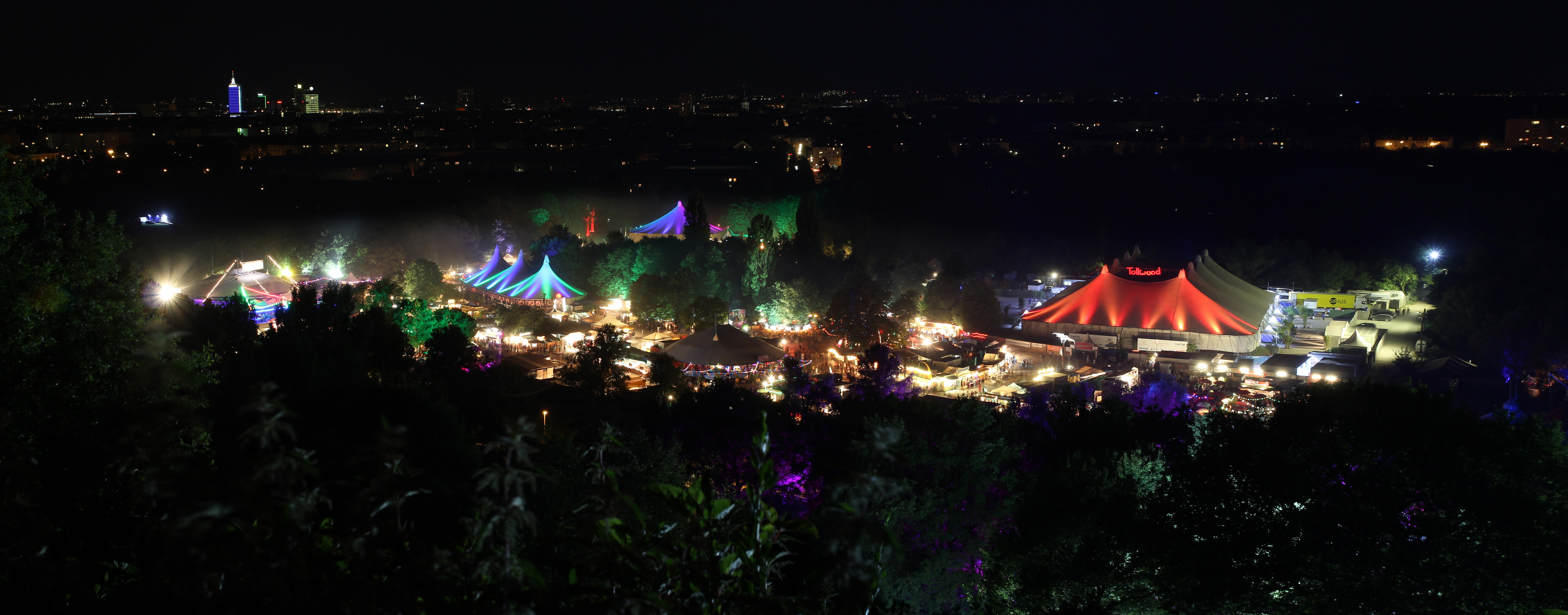 Blick bei Nacht auf das Tollwood Festival im Sommer 2013